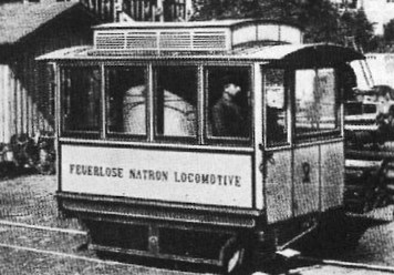 Beschreibung: Feuerlose Natron-Straßenbahn-Lokomotive in Aachen Fotograf: presse03, erstellt von Unbekannt 1884, Archiv ASEAG Lizenz: GNU-FDL